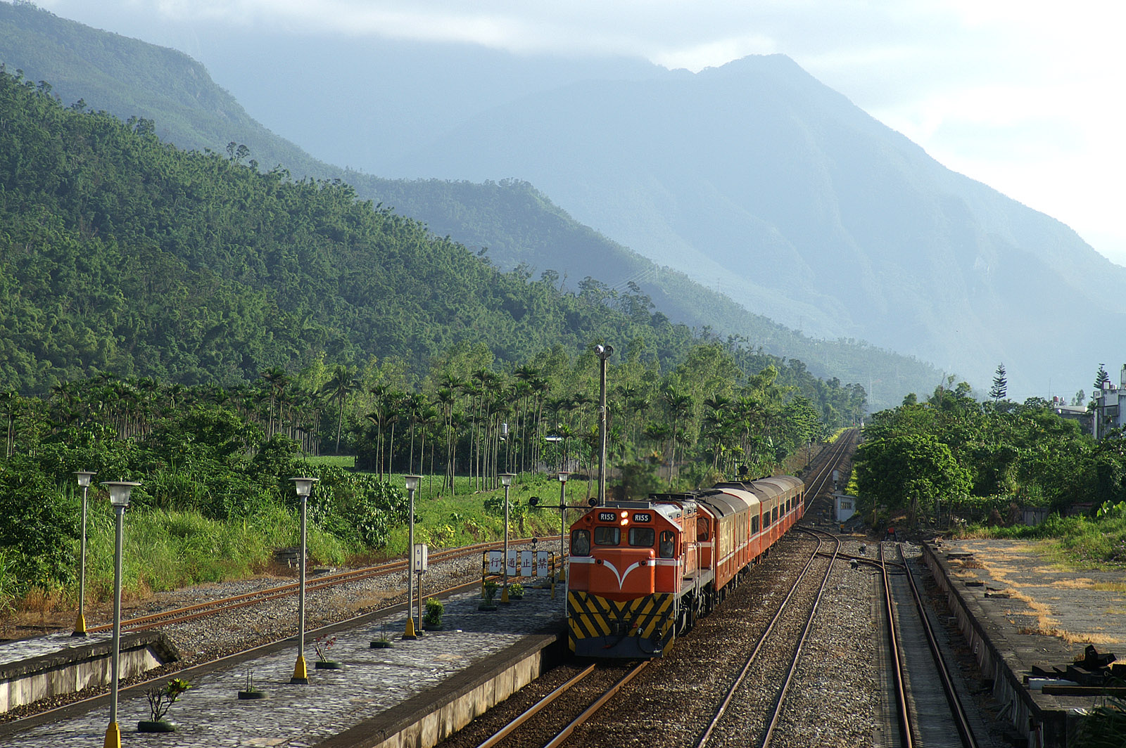 臺灣鐵路管理局柴電機車R155牽引莒光號客車進入臺東線志學車站。